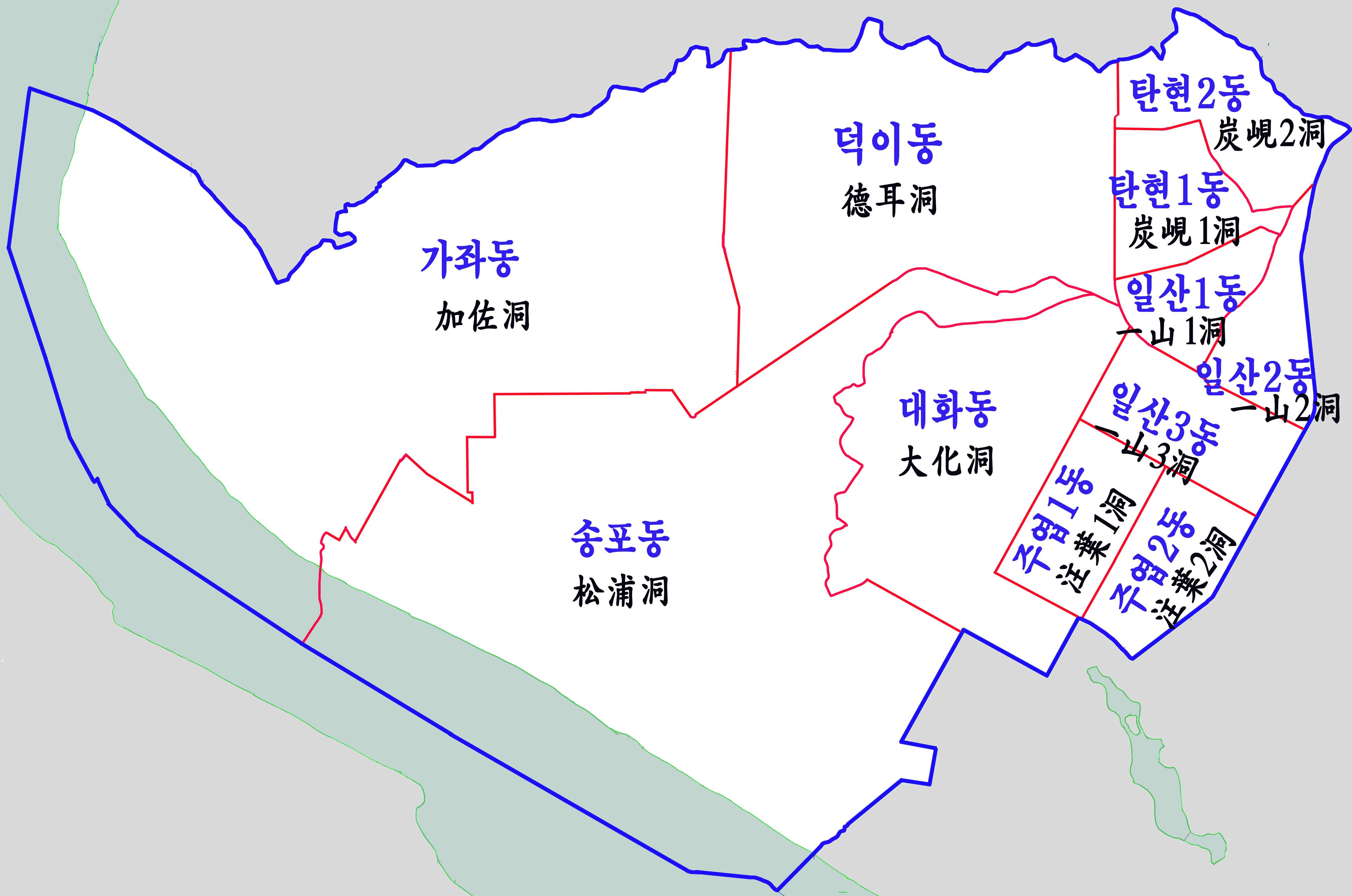 고양시 일산서구 행정구역도